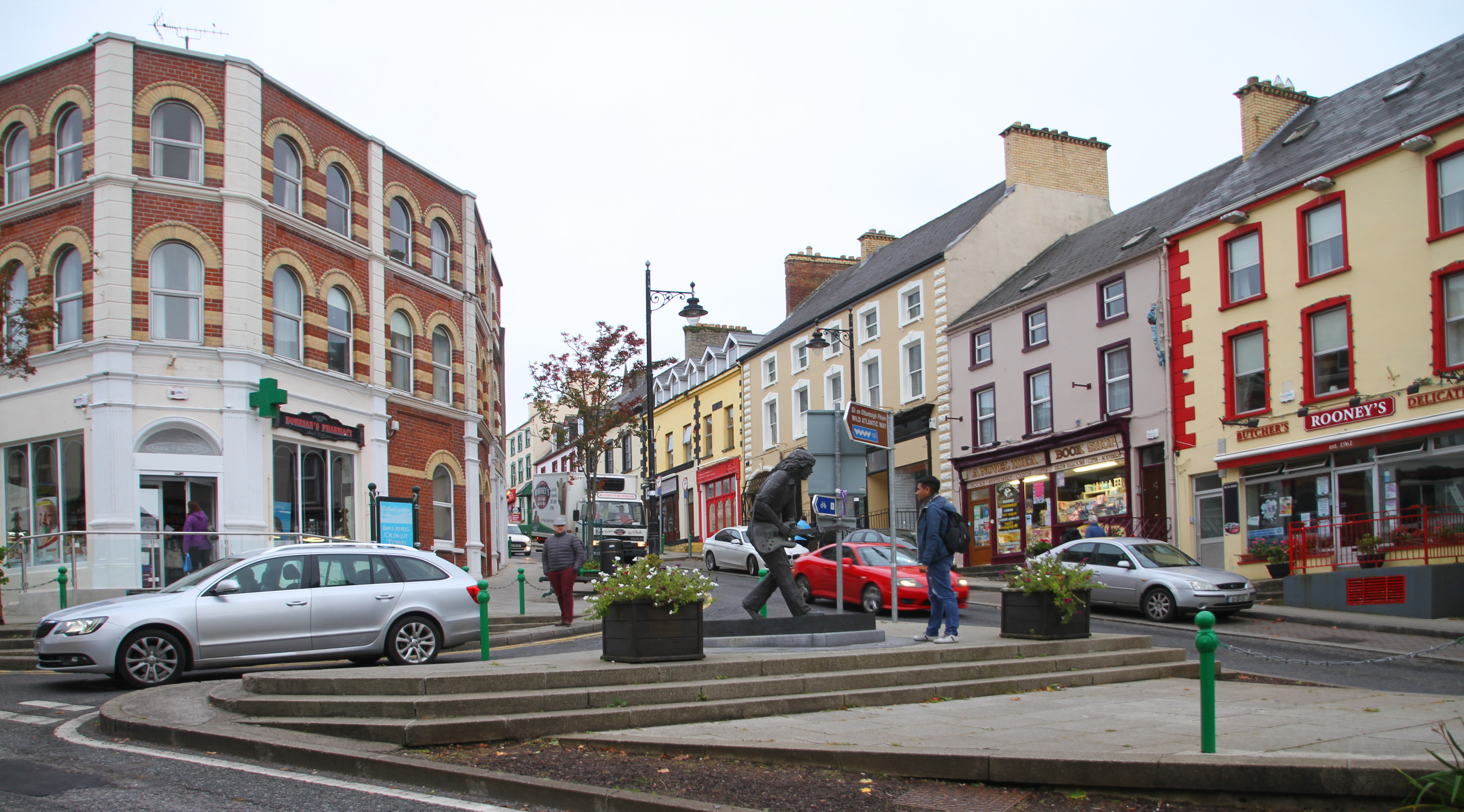 Ballyshannon